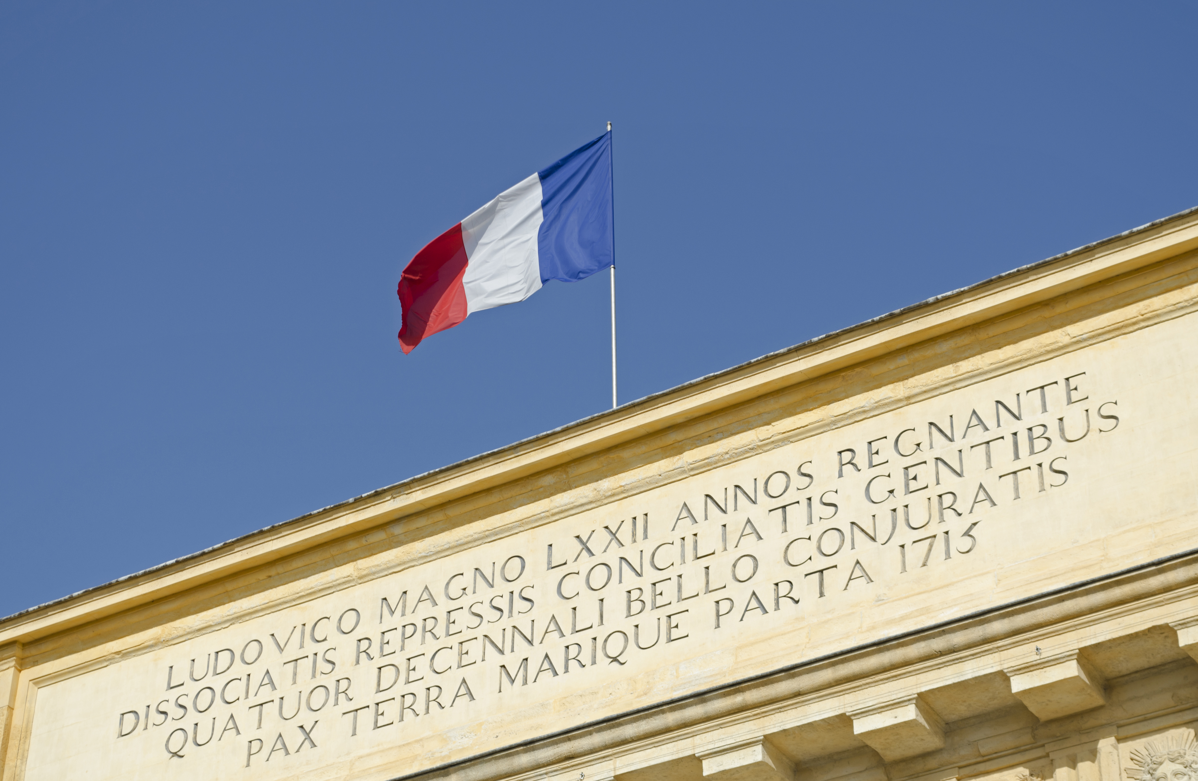 Inscriptions sur l'arc de triomphe de montpellier